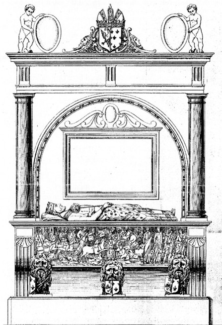 Tombeau de Louis le Pieux édifié par Henri II et intégrant le sarcophage originel.